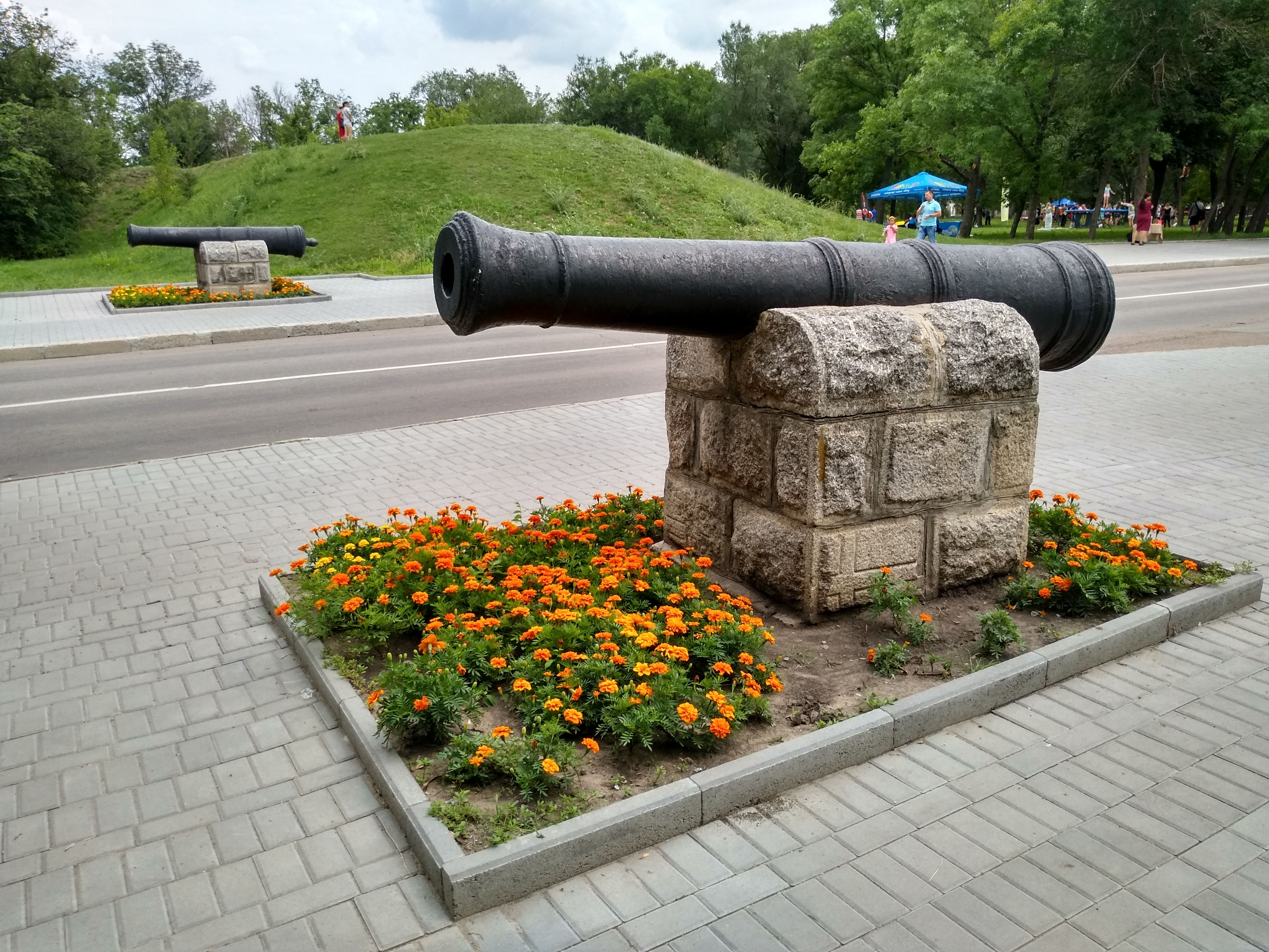 Пам'ятник бойової слави — гармати, Кропивницький, вул. Ушакова